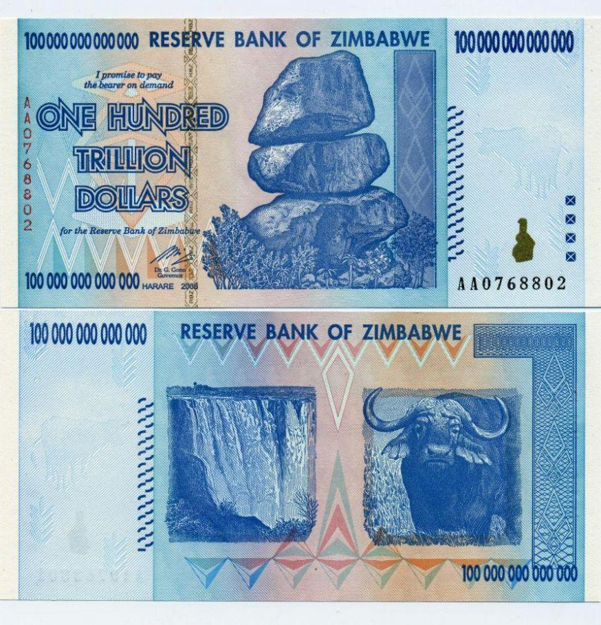 banknot emitowany w czasie hiperinflacji w Zimbabwe